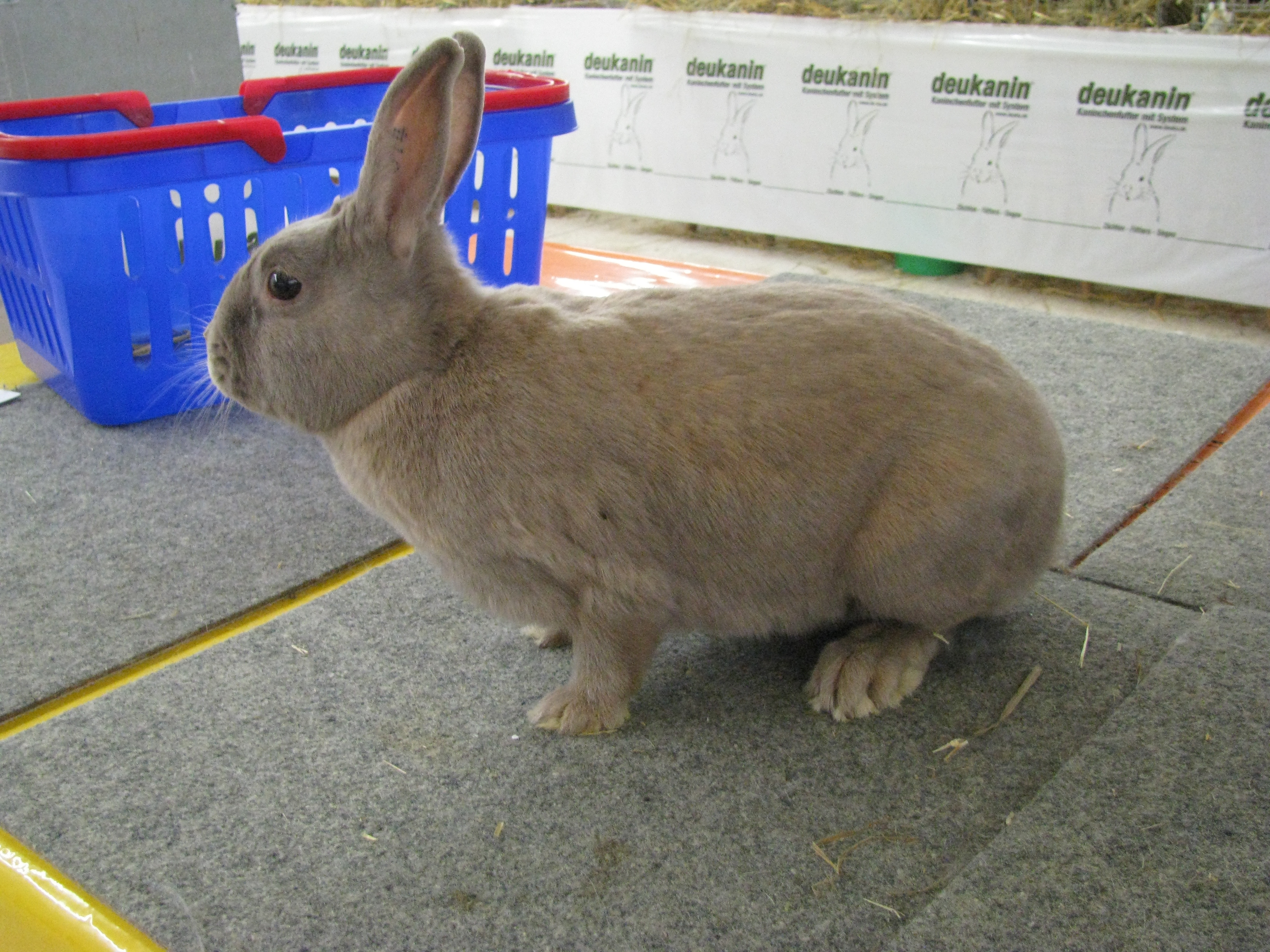 Separator-Kaninchen